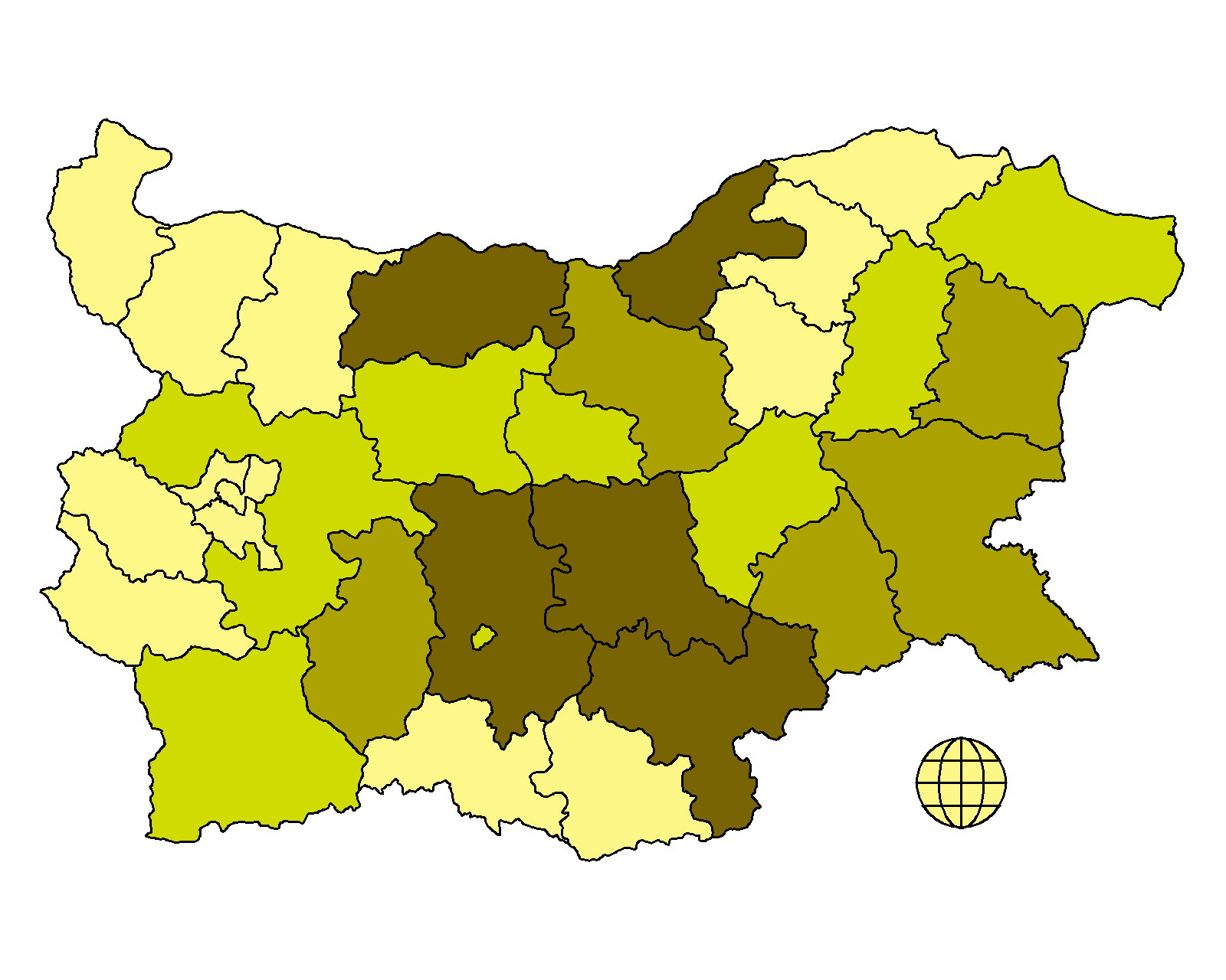 Гласуване по райони за Волен Сидеров на първия тур на президентските избори през 2006. Всеки от цветовете съответства на приблизително 1/4 от подадените гласове По тъмният цвят съответства на получен по-голям процент от гласовете